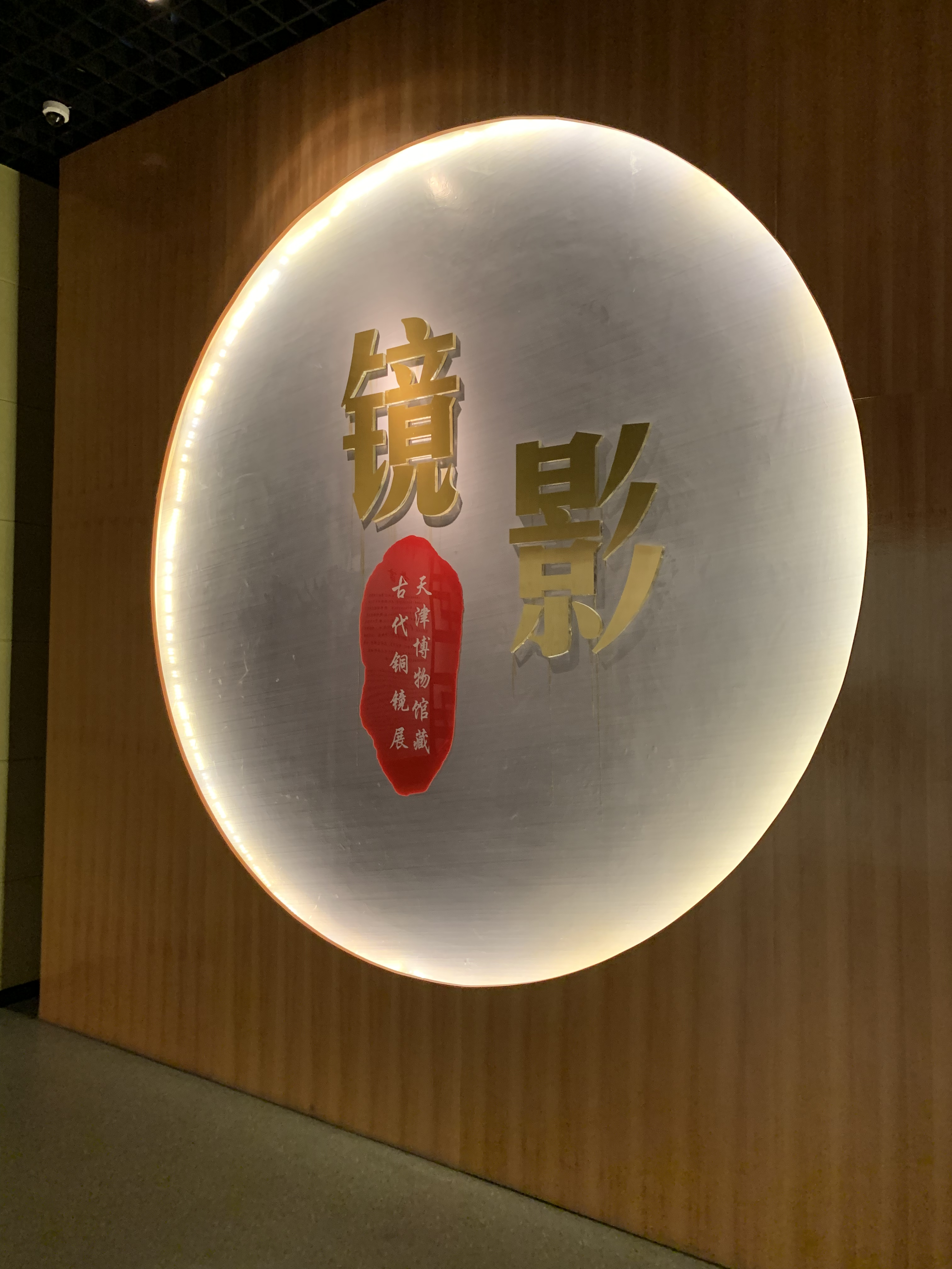 中文（中国大陆）: 镜影——天津博物馆藏古代铜镜展